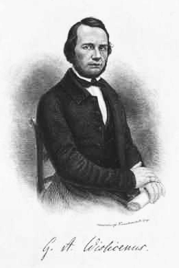 Gustav Adolf Wislicenus. Verlag Naumburgs Kunstanstalt Leipzig